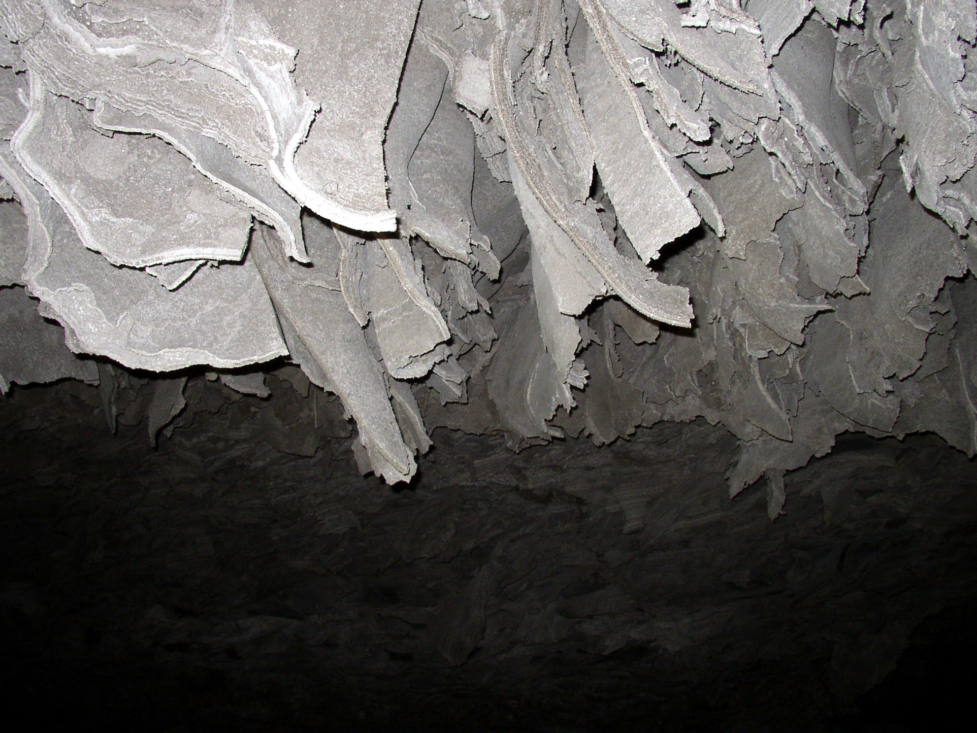 Abblätternder Gips ("Gipslappen") in der Barbarossahöhle